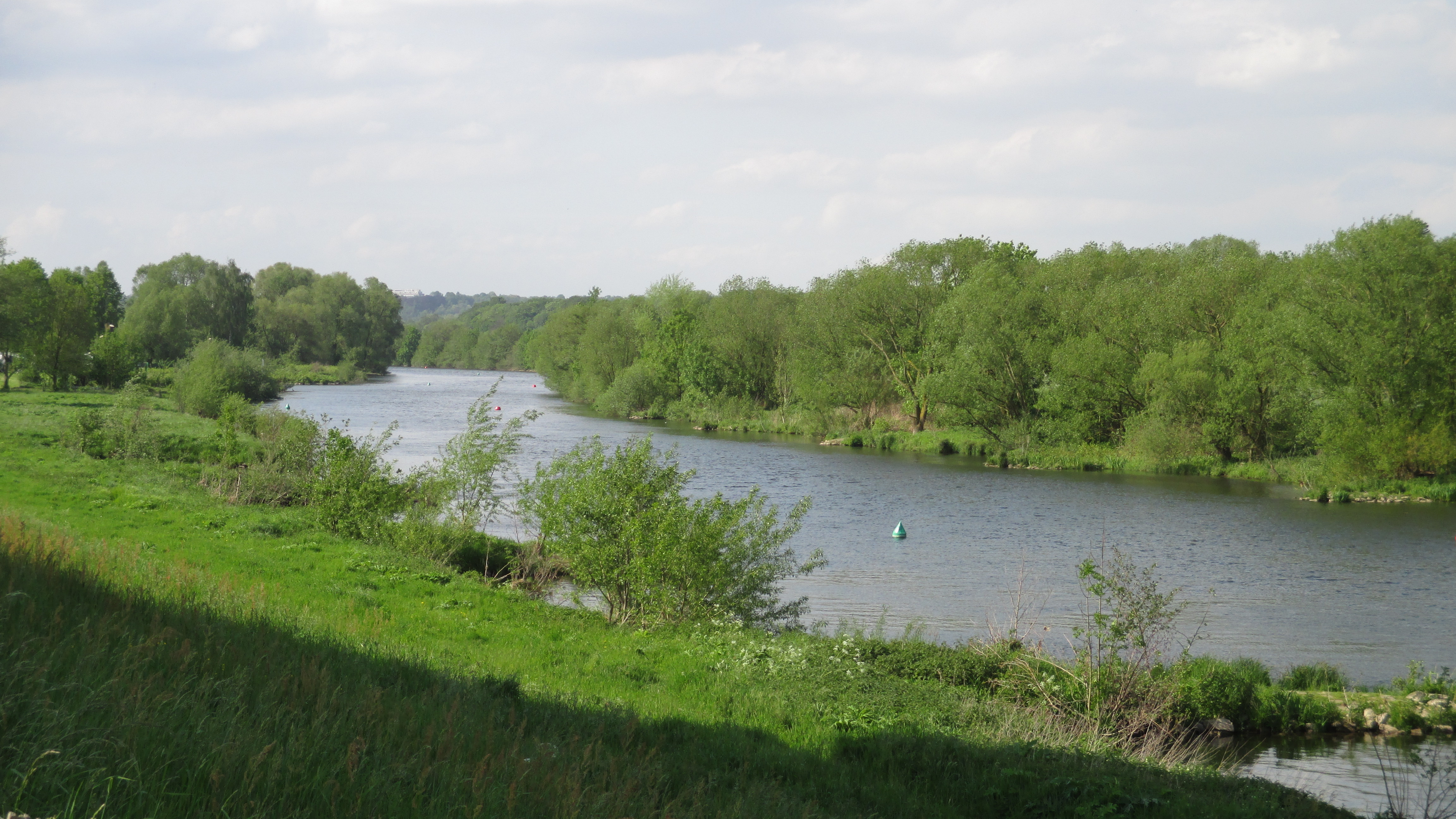 Am Damm unter der Ruhrtalbrücke (B1) schlängelt sich die Ruhr am Ruhrstrand entlang.